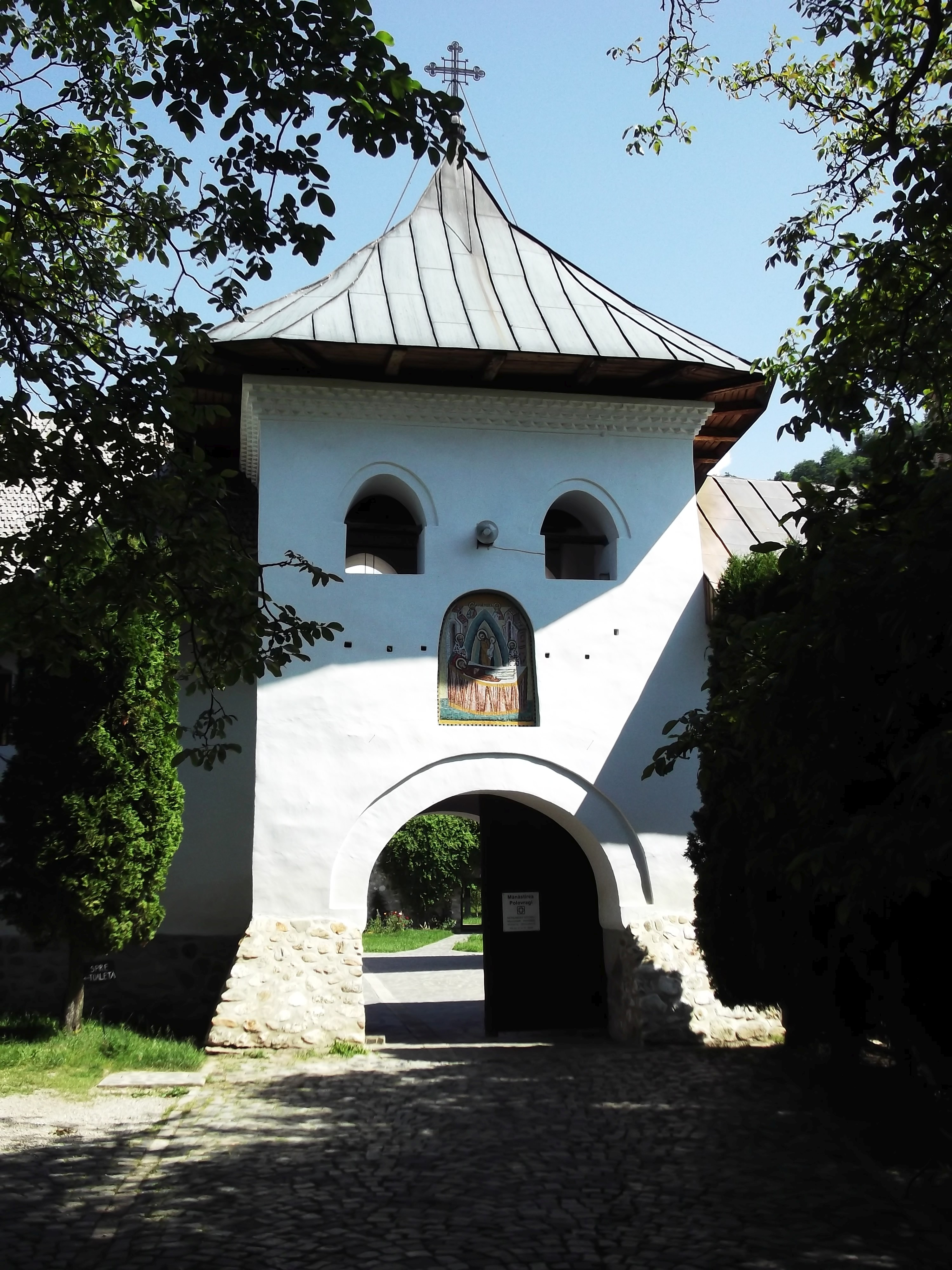 Mănăstirea Polovragi: Turnul-clopotniță 04